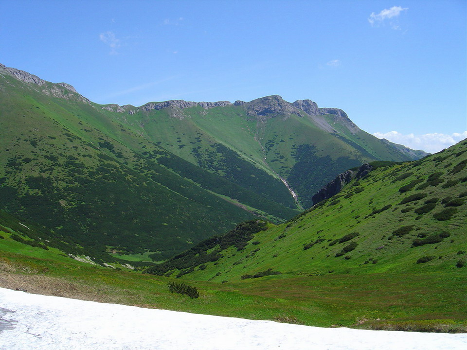 Predne Jatky and Predne Medodoly from Kopske sedlo